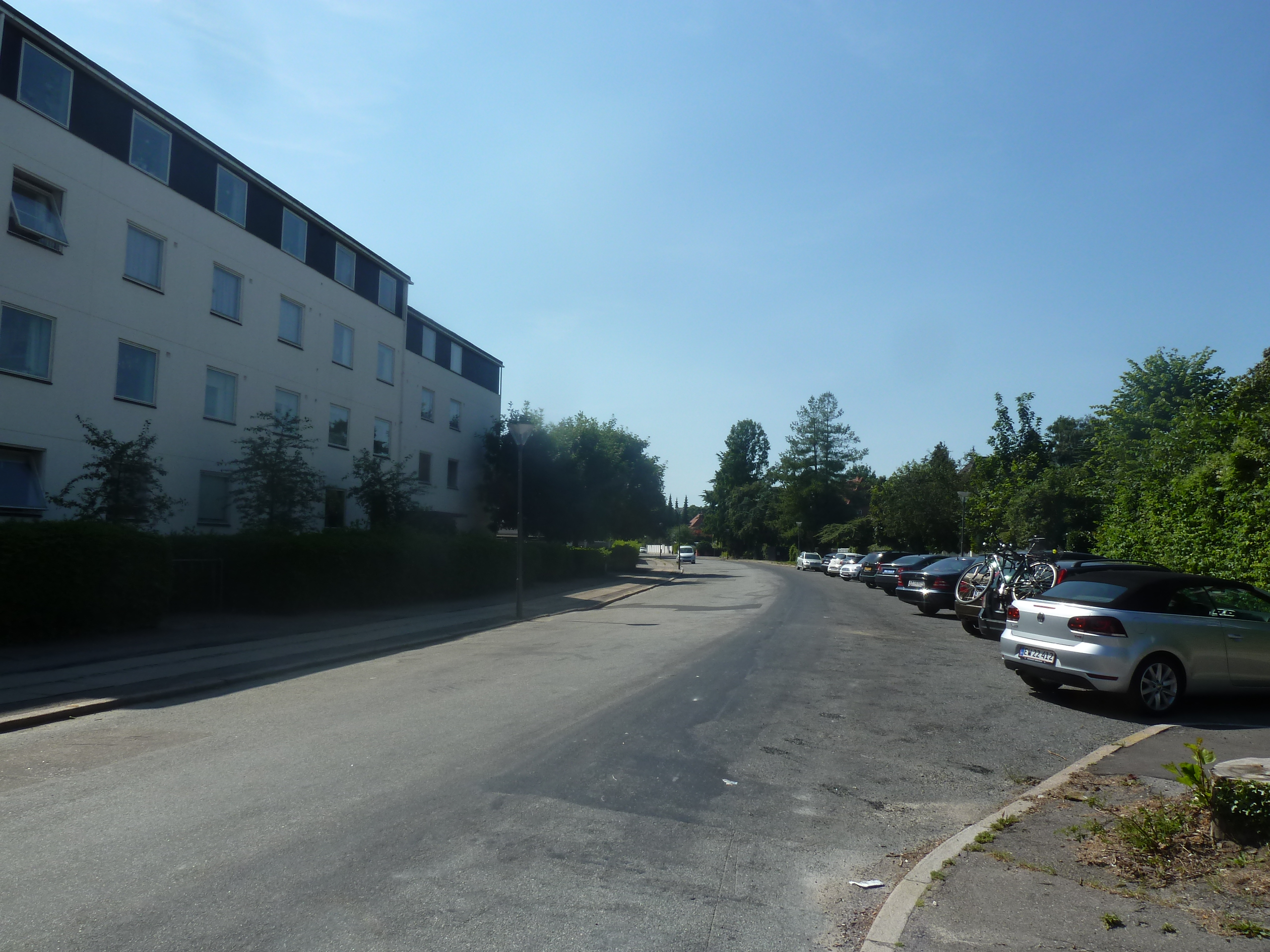 The street Rosbæksvej in Østerbro in Copenhagen.